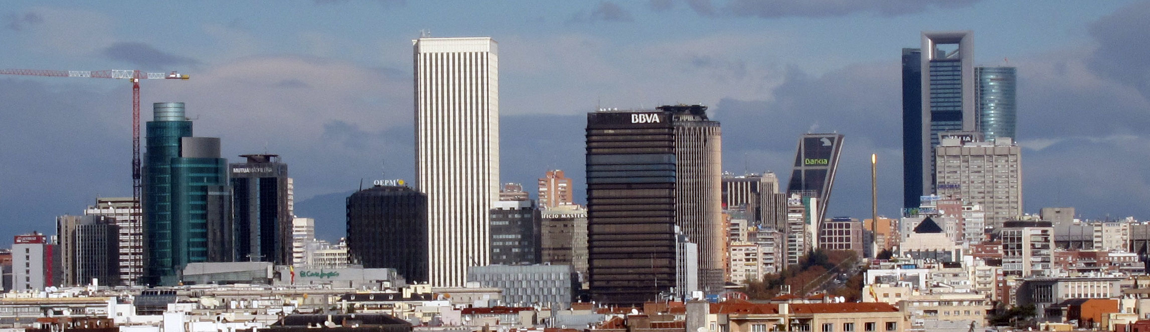 Panorama urbano de Azca (Madrid)